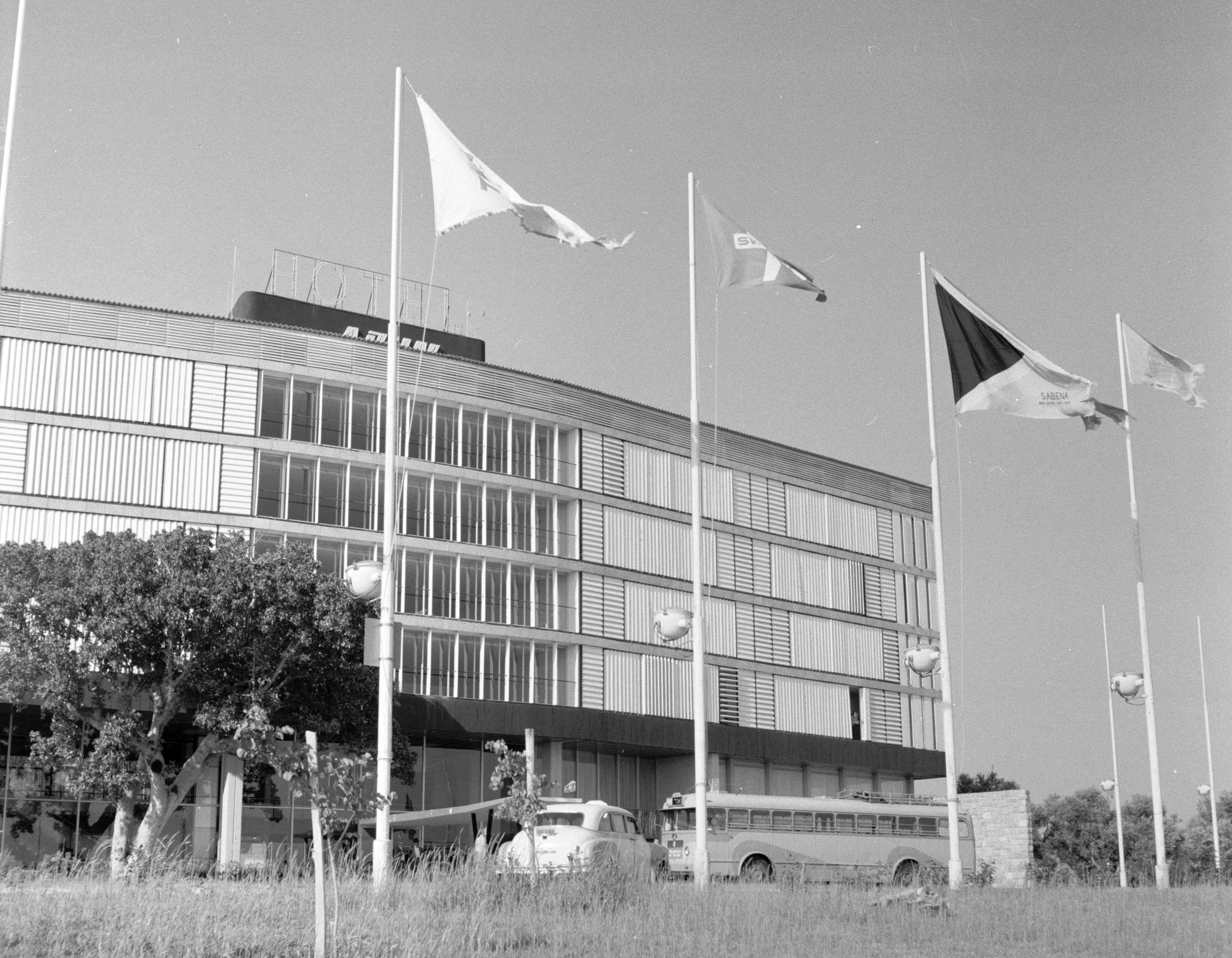 Voorgevel van het Avia-hotel met vlaggen en auto's ervoor. Reportage / Serie: Israël: Kirjat Gat (Kiryat Gat).